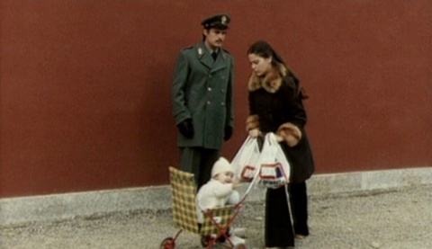 Képkocka az „Olcsó regény” (Romanzo popolare) című filmből